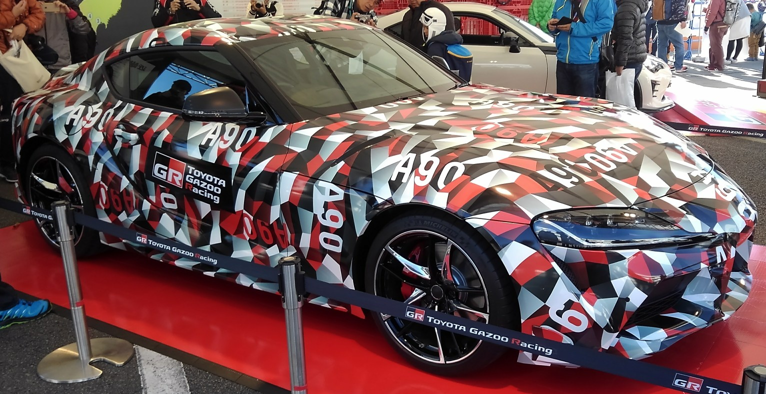 TGRFにて展示されたトヨタ・スープラ（A90）のプロトタイプ